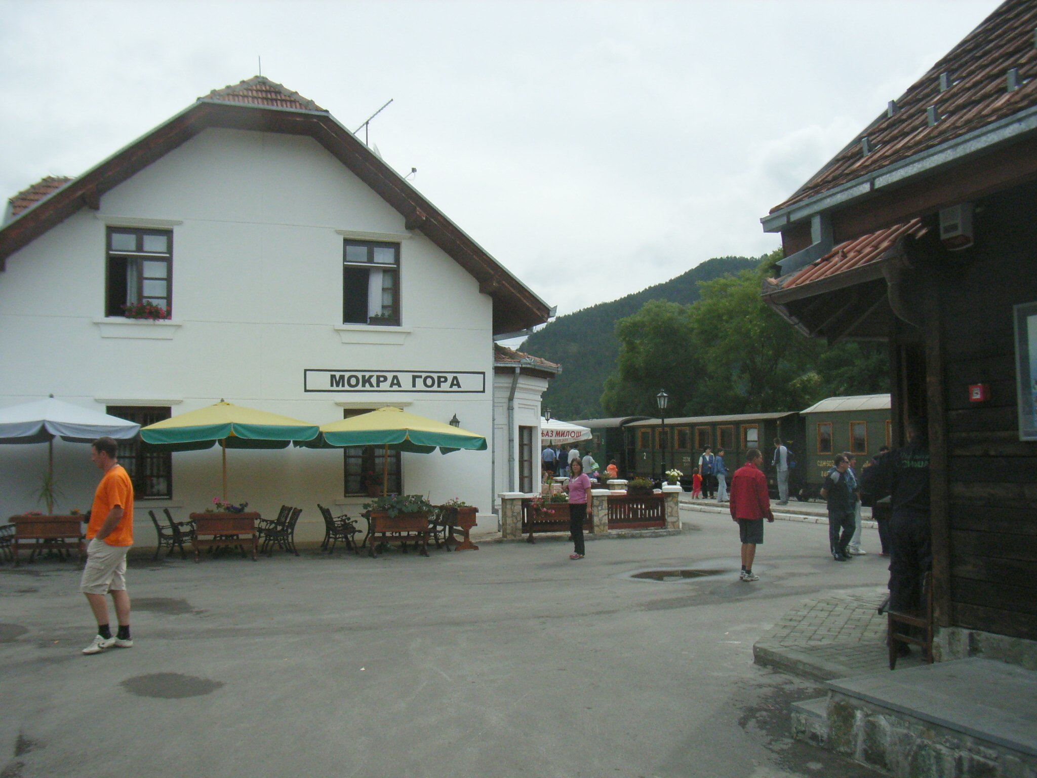 Bahnhof Mokra Gora der Šarganska osmica in Serbien